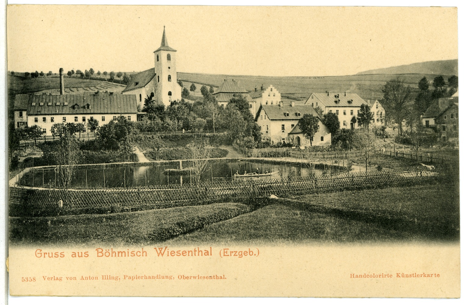 Wiesental; Blick über den Gondelteich zur Kirche This postcard is from publisher Brück & Sohn in Meißen ( postcard has a unique number 05358 and is available in a higher resolution at the publisher. This images was uploaded in a cooperation project between Wikipedians and the publisher.